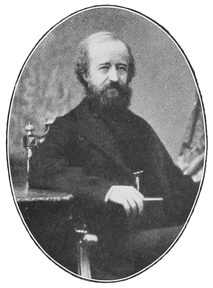 Photographie de Eugène Pierre Nicolas Fournier - Publiée dans Acta horti bergiani : Meddelanden från Kongl. Svenska Vetenskaps-Akademiens Trädgård Bergielund - Planche 136 - Stockholm 1891